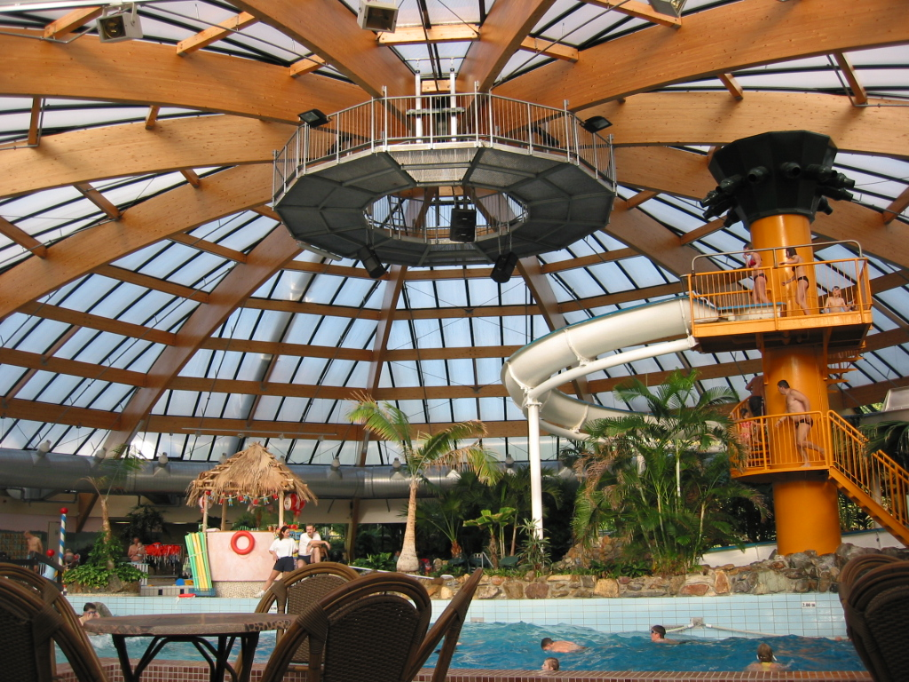 40 meter overspanning zwembad gelamineerde hekospanten. Lommerbergen